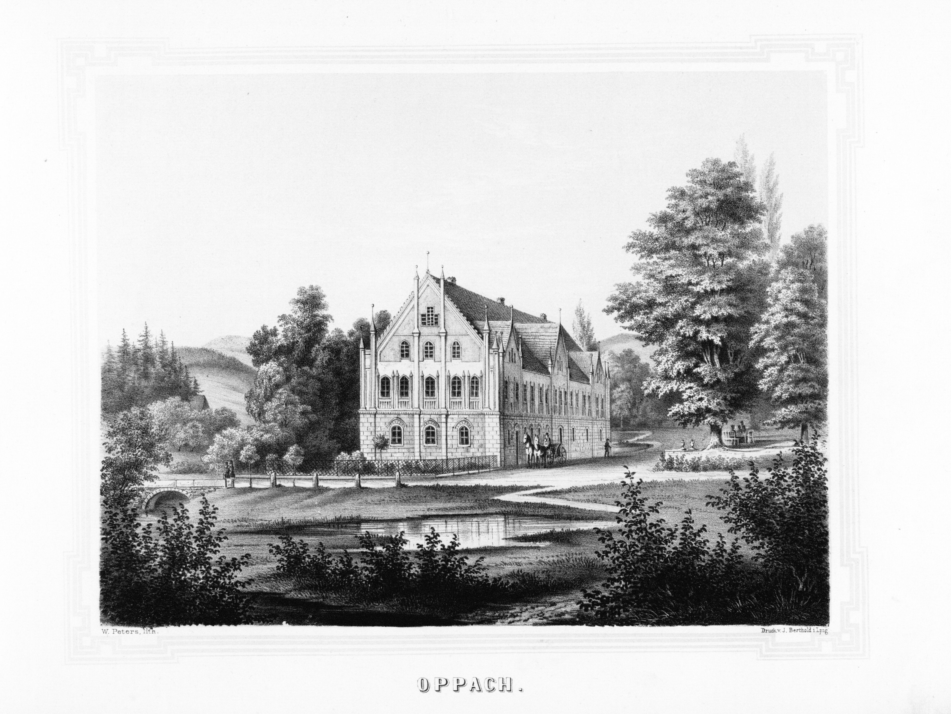 Oppach aus: Album der Rittergüter und Schlösser im Königreiche Sachsen Markgrafenthum Oberlausitz Section: III